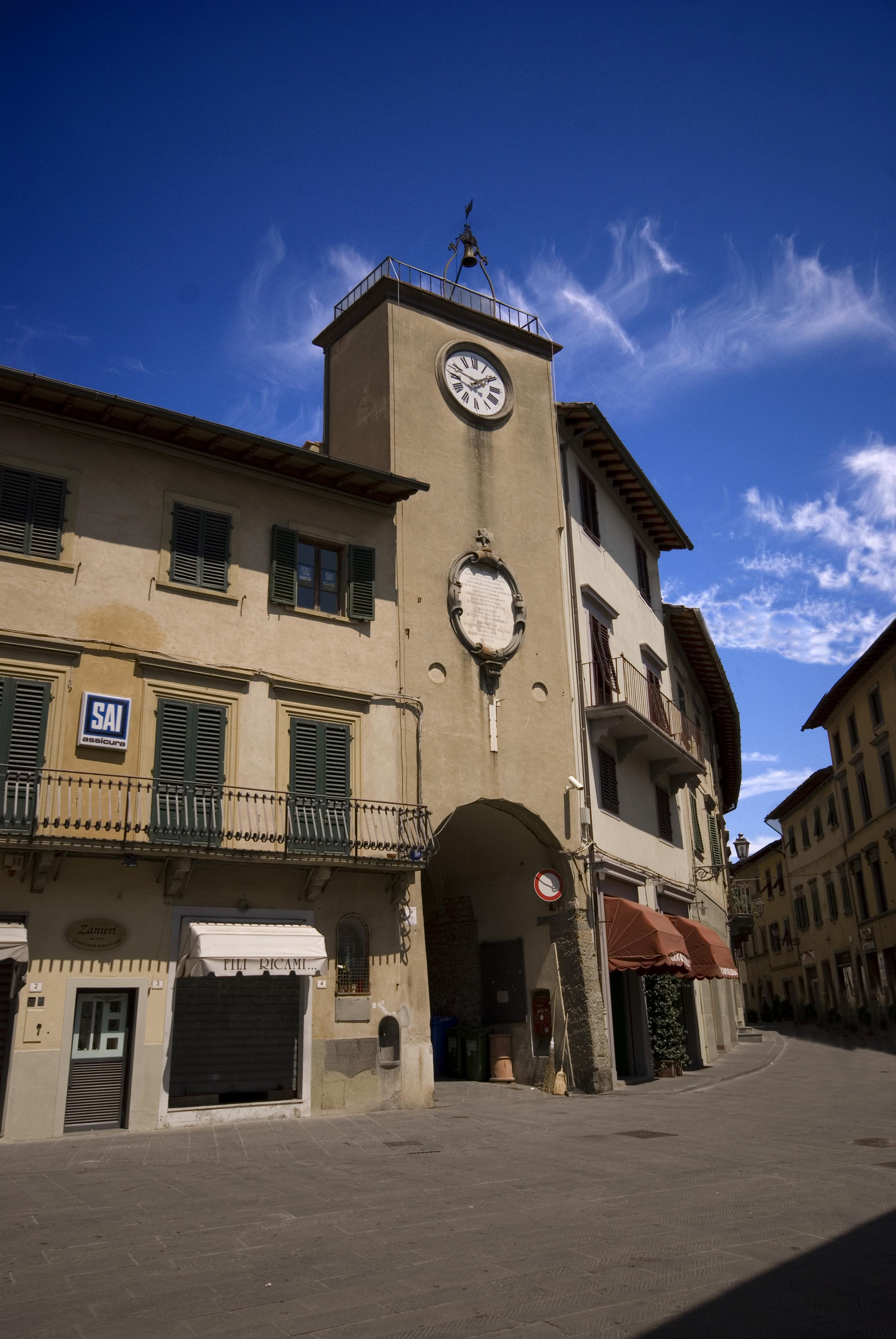 Torre dell'Orologio a San Casciano in Val di Pesa